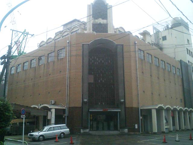 文化放送四谷（東京都新宿区若葉1丁目5番地）旧局舎演奏所兼旧非常用予備送信所。竣工時の名称は『セントポール・ラジオ・センター』。2006年8月9日投稿者撮影。